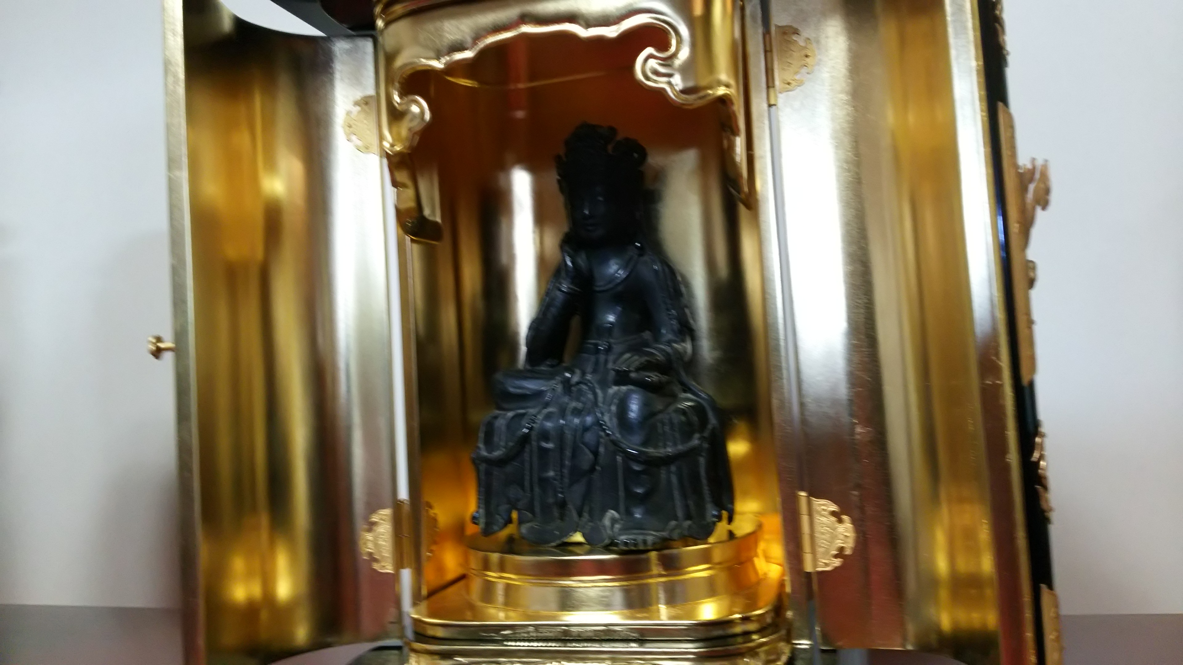 1871年に廃寺とされた旧若沢寺にあった仏像で、現在は盛泉寺にある。納めてある厨子は現代の物。この仏像の特色から、奈良時代時代後期の作と鑑定されている。1988年 10月26日に長野県宝に指定されている。像高22cm。